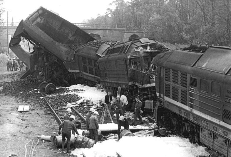 ADN-ZB Weisflog-16.5.1987 Bez. Cottbus: Kollision Zum Zusammenstoss zweier Güterzüge kam es in der Nacht vom 15. zum 16.5.1987 auf dem Bahnhof Schwarzkollm, Kreis Hoyerswerda. Dabei entgleisten 14 Wagen, von denen 12 umstürzten. Ein Lokführer erlitt Verletzungen. Es entstand erheblicher Sachschaden.